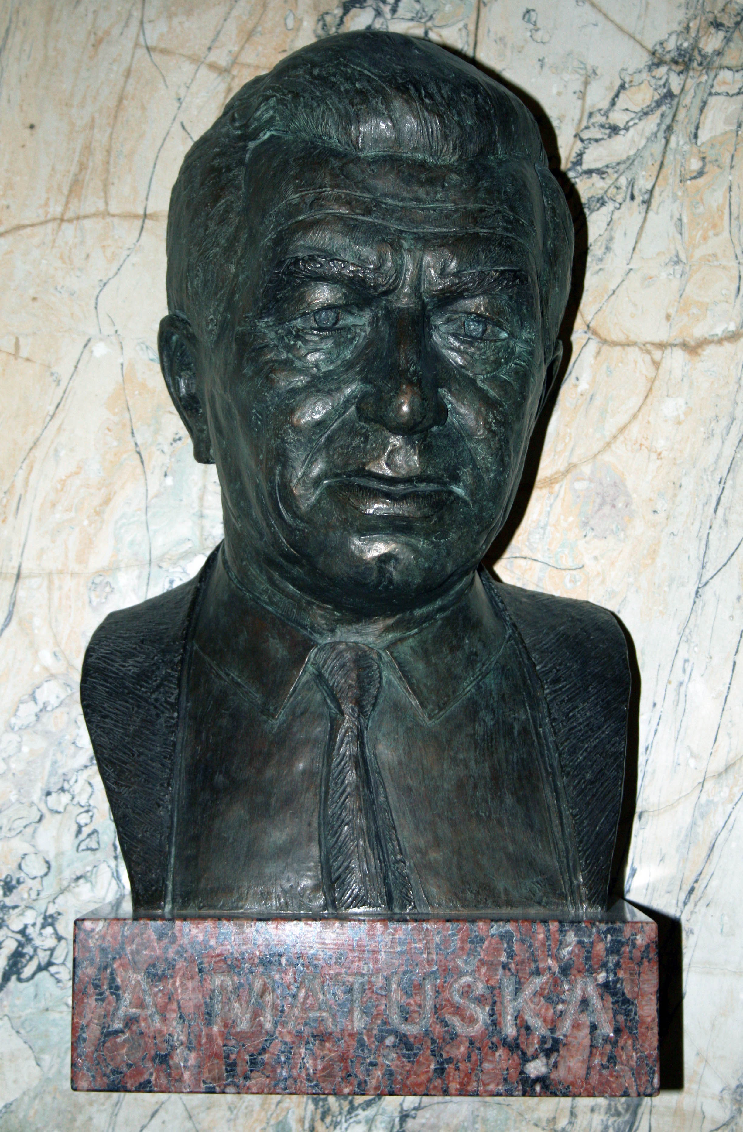 Busta Alexandra Mastušku, 1910 - 1975 literárneho kritika a esejistu. Tvorca literárnokritickej eseje v slovenskej literatúre